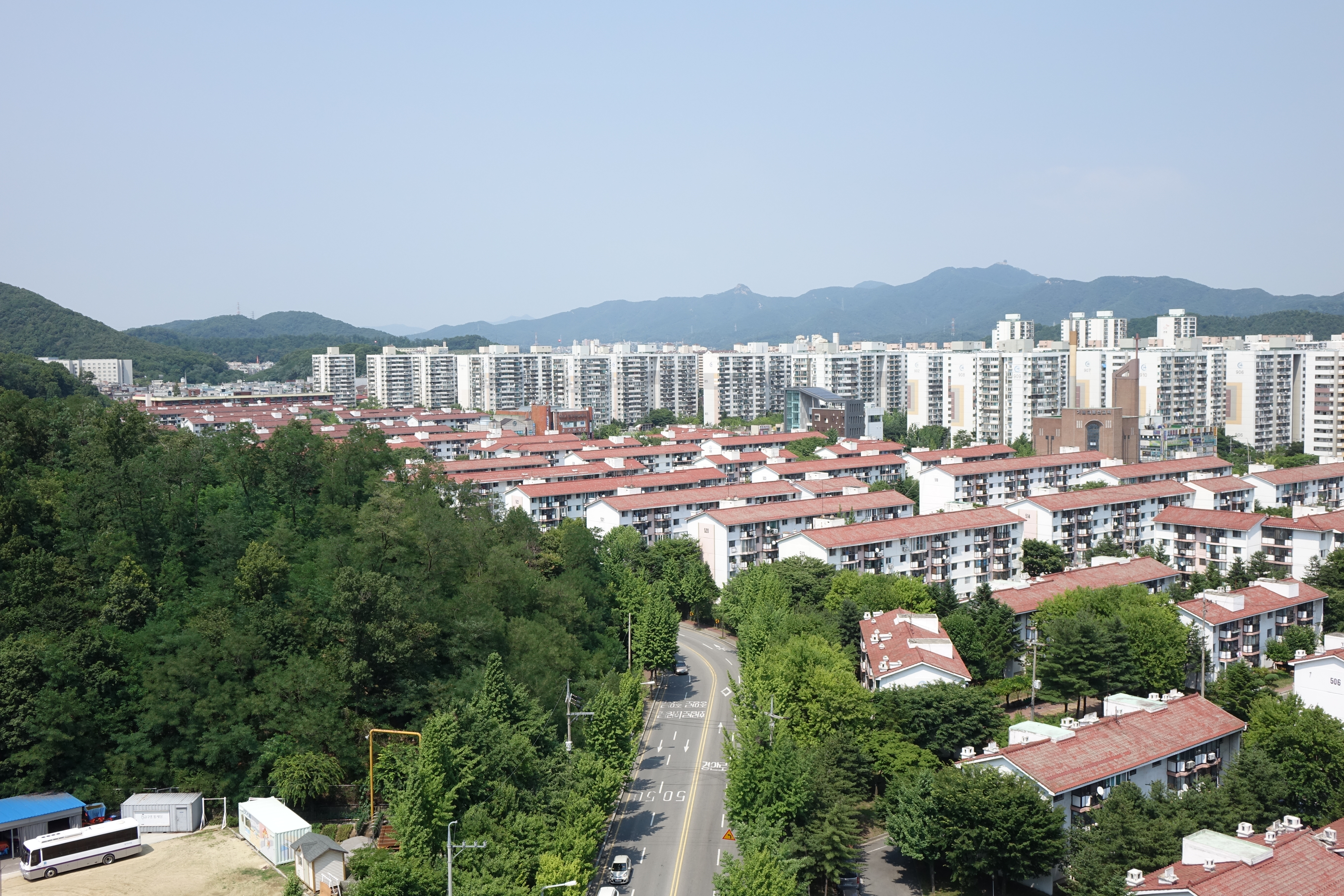 본인은 사진의 저작권자로서, 이 저작물을 'CC0 1.0 보편적 퍼블릭 도메인 기증' 저작권으로 배포합니다. 이에 따라, 본인은 법이 정한 범위 내에서 저작인접권을 포함해 저작권법에 따라 전세계적으로 해당 저작물에 대해 본인이 갖는 일체의 권리를 포기하였어요. 본인의 허락을 구하지 않아도 누구나 이 저작물을 상업적인 목적을 포함 모든 목적으로 복사, 수정, 배포, 실연하실 수 있어요. 단 사진에 사람이 있는 경우 사용 전에 해당 인물의 동의가 필요하며 이는 초상권 및 퍼블리시티권을 사진 속 인물이 보유하고 있기 때문입니다. 전문적인 편집을 위해 사용되는 원본 파일을 원하시는 분은 원본을 원하시는 파일의 이름을 보내주세요. 감사합니다. 2015년 7월 25일. 최광모.